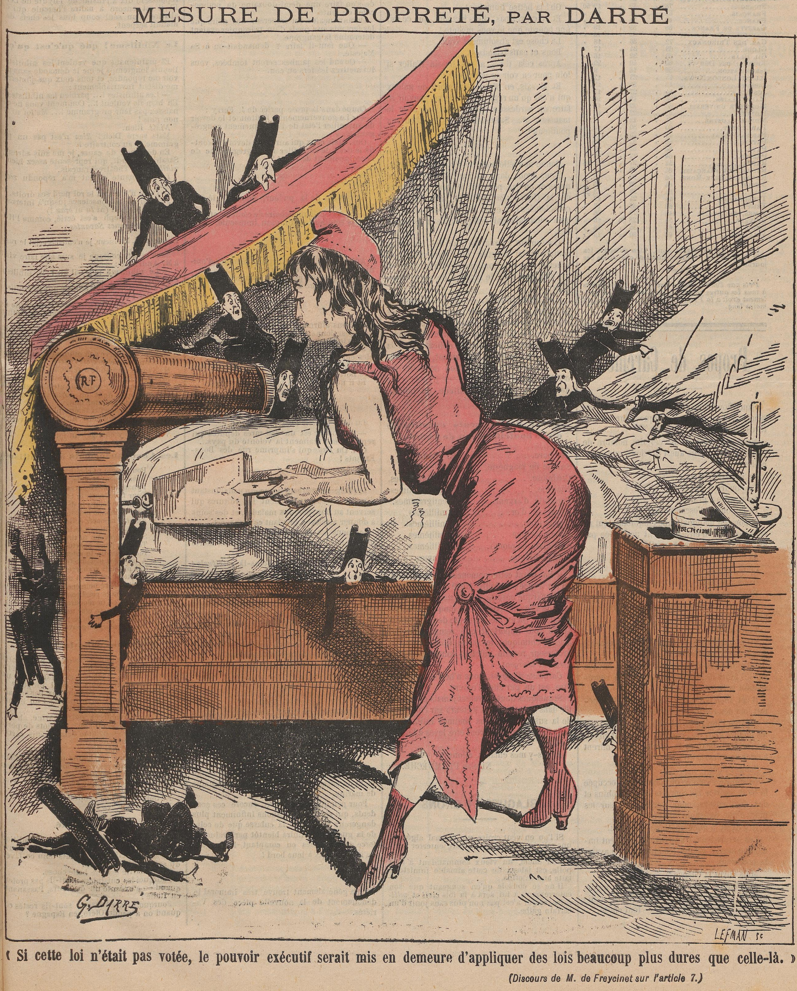 Caricature représentant la République chassant les Jésuites de France à l'occasion de la loi sur l'enseignement supérieur.